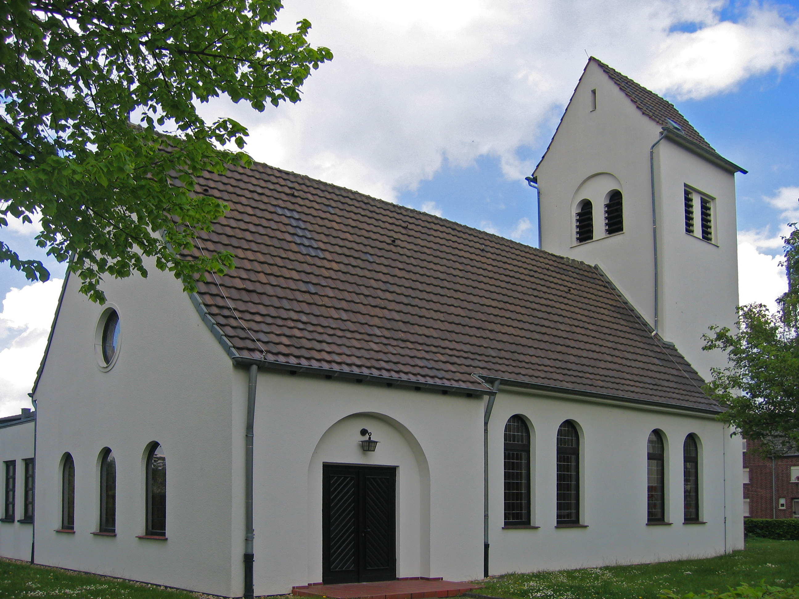 Evangelische Christuskirche in Kerpen-Sindorf